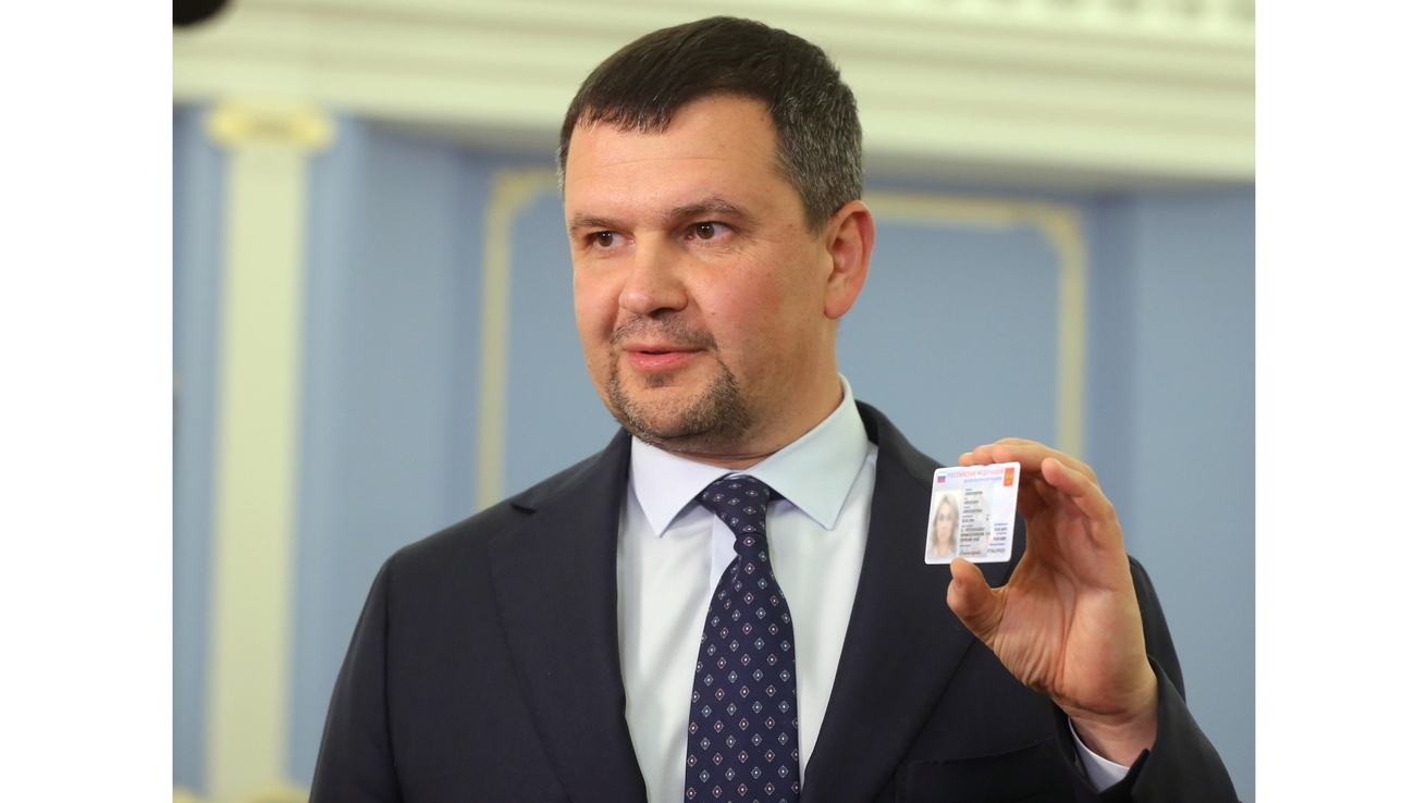 Брифинг Максима Акимова по завершении совещания о внедрении электронного удостоверения личности гражданина Российской Федерации